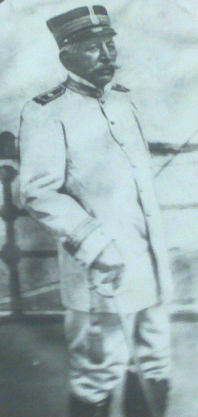 Litografía del Coronel Carlos Miranda Vera